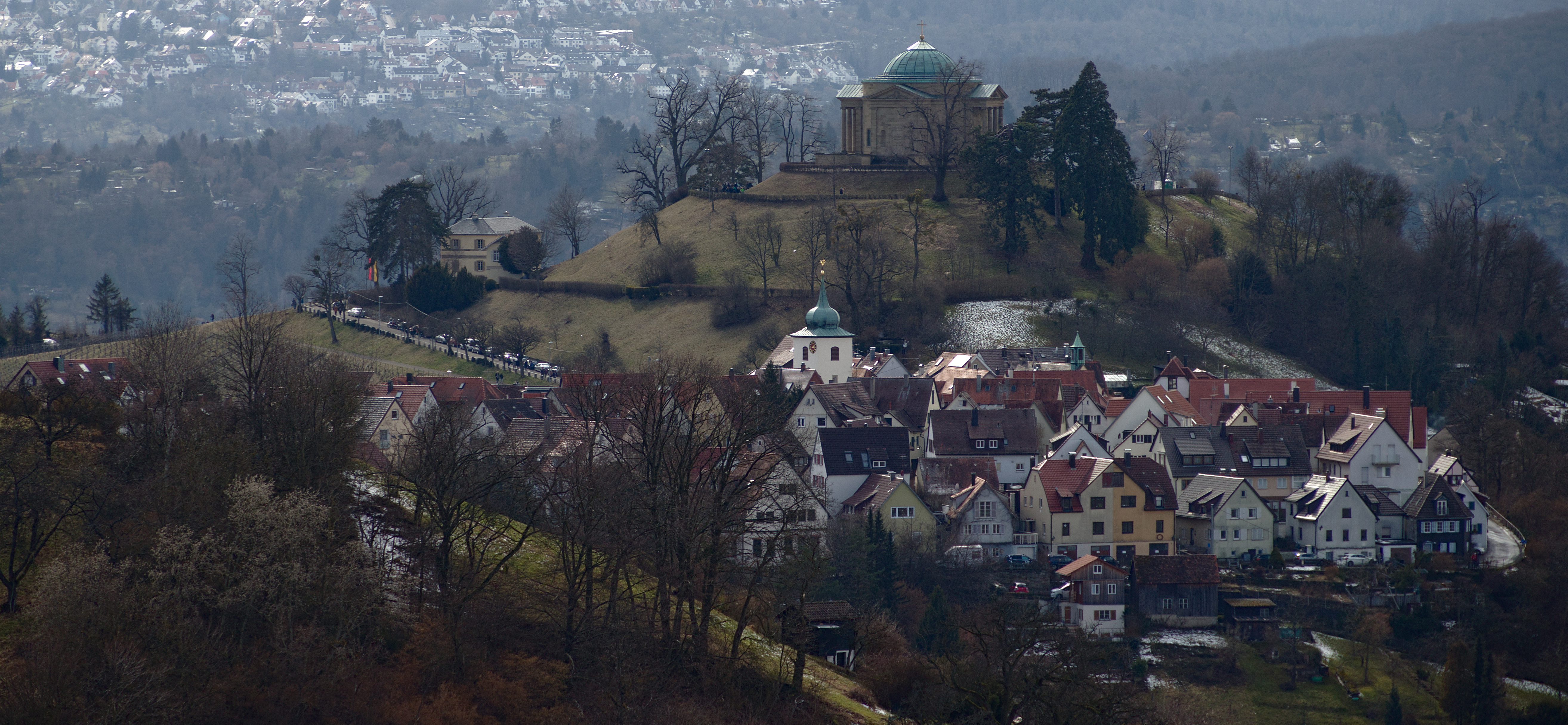 Stuttgart-Rotenberg mit der Rückseite der Grabkapelle auf dem Württemberg. Aufgenommen vom Kapellberg aus nordnordöstlicher Richtung